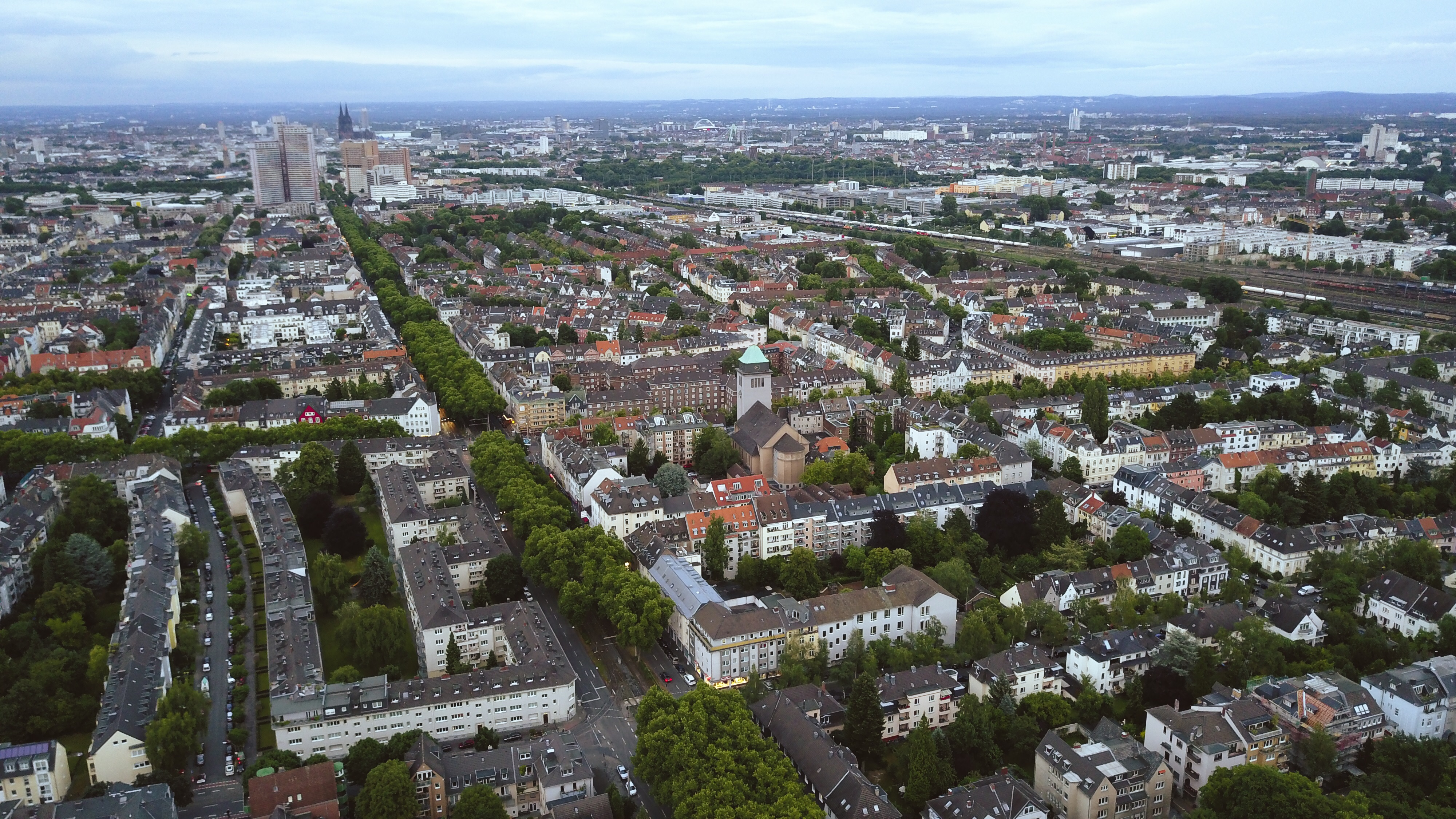 Der Kölner Stadtteil Klettenberg aus östlicher Perspektive. Links von der Luxemburgerstraße (mit der doppelten Baumreihe und der Stadtbahn) grenzt der Stadtteil Sülz an.